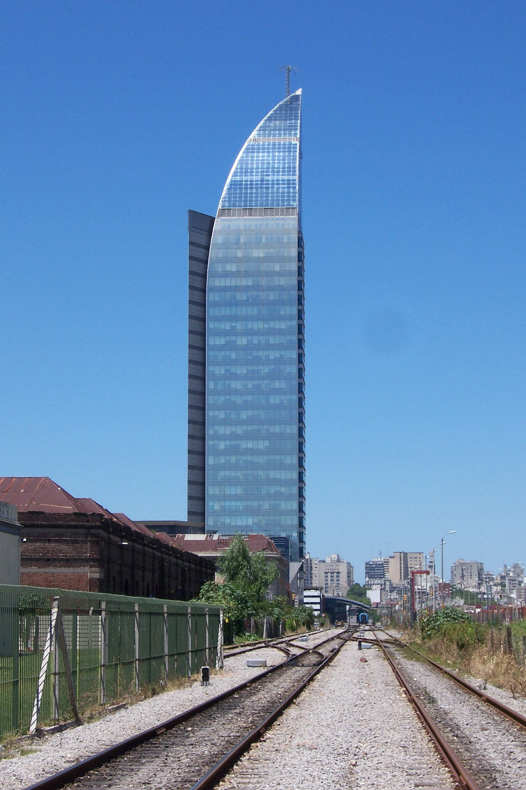 Torre de ANTEL, también llamada Torre de las Telecomunicaciones, proyecto del Arq. Carlos Ott, Montevideo.